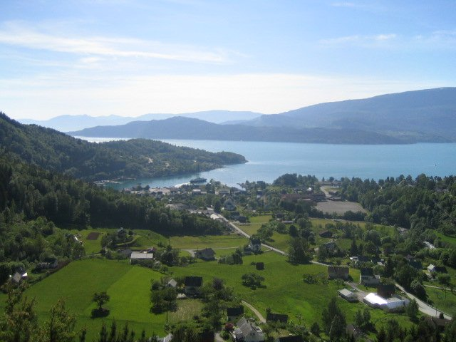 Udsigt mod vest over Jondal centrum.